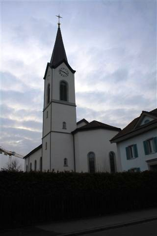 Kirche Dottikon AG, Schweiz